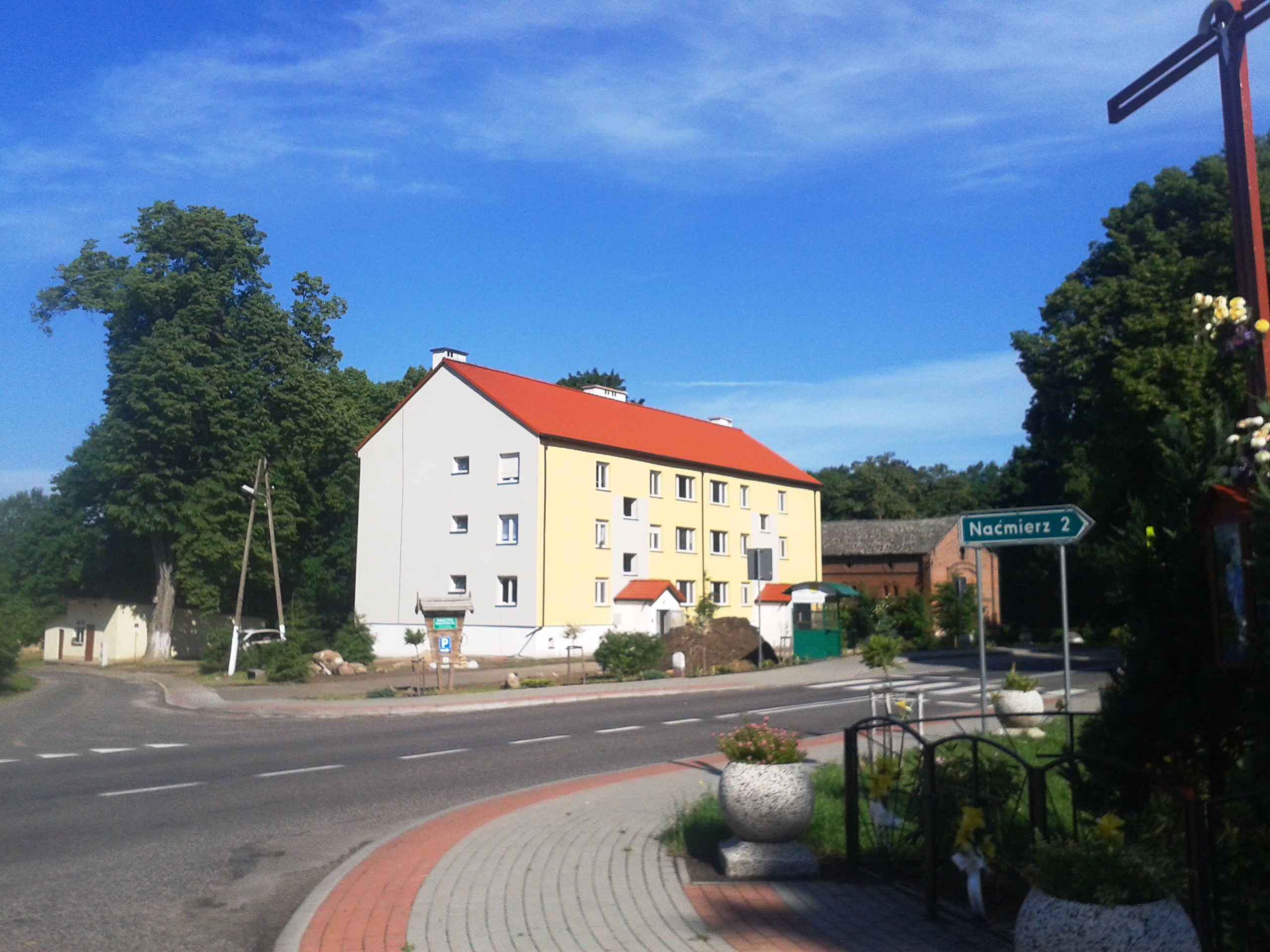 Przemysław w gminie Resko